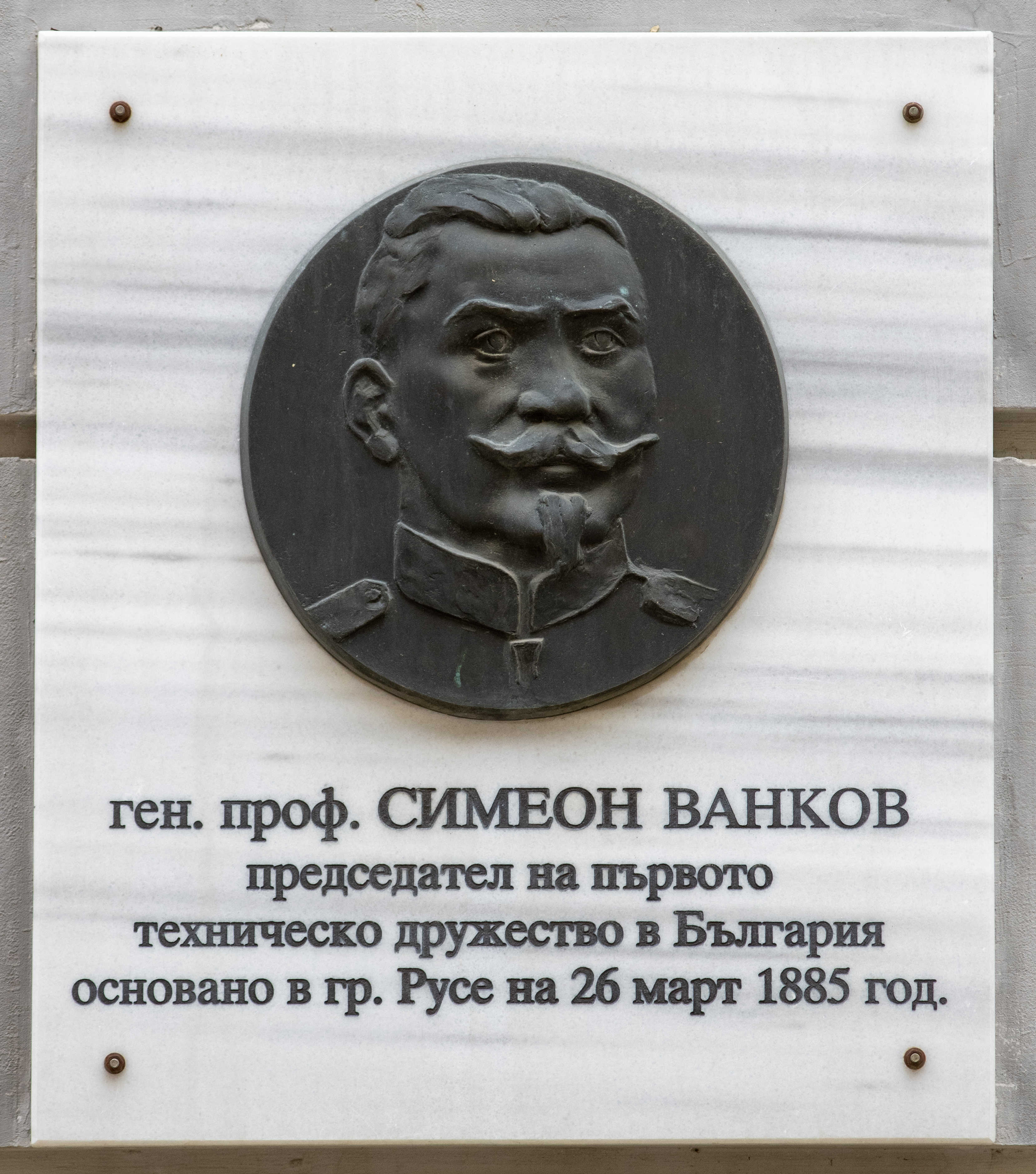 Снимката документира паметна плоча на проф. Симеон Ванков в град Русе.